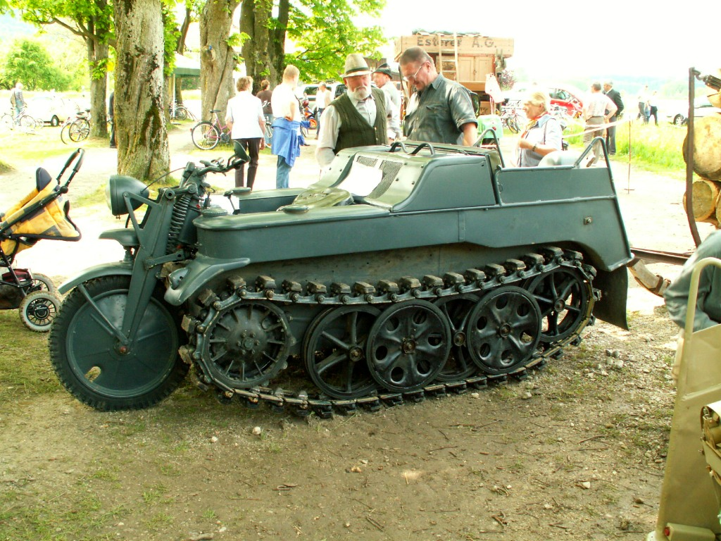 NSU-Kettenkrad mit 36 PS (Baujahr 1943)